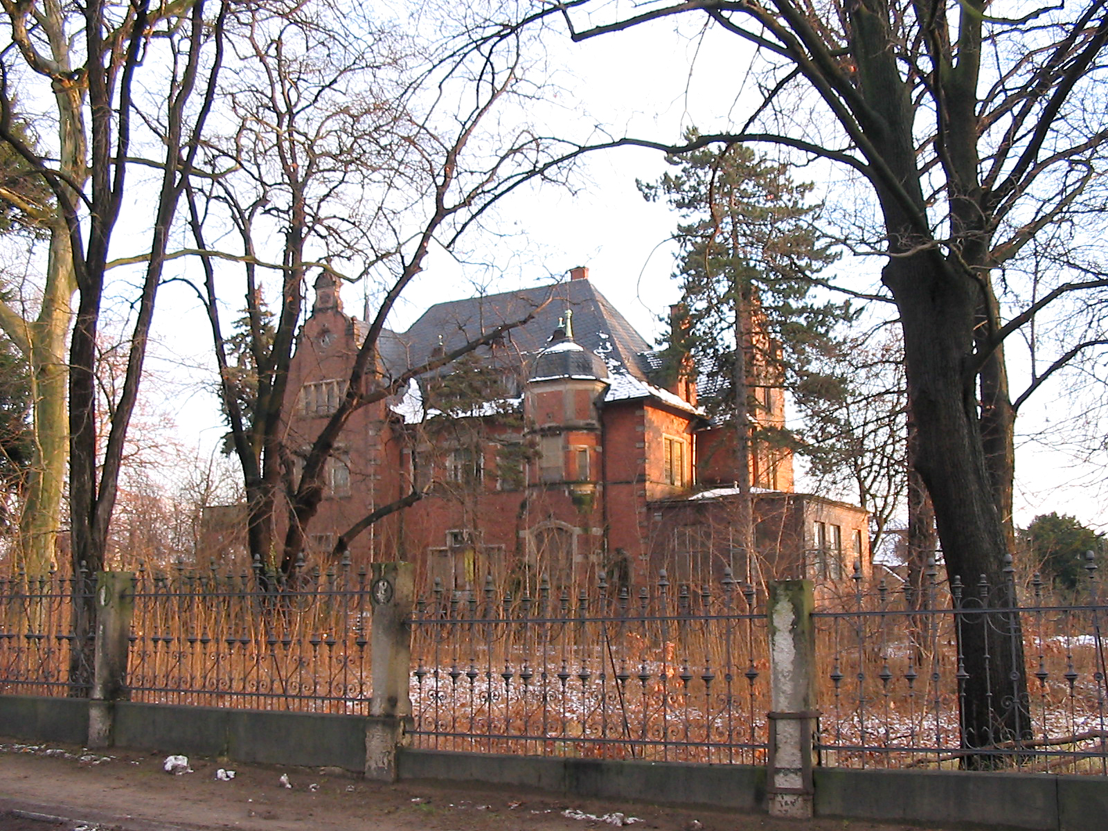 Radebeul, Villa Kolbe, von Südwesten